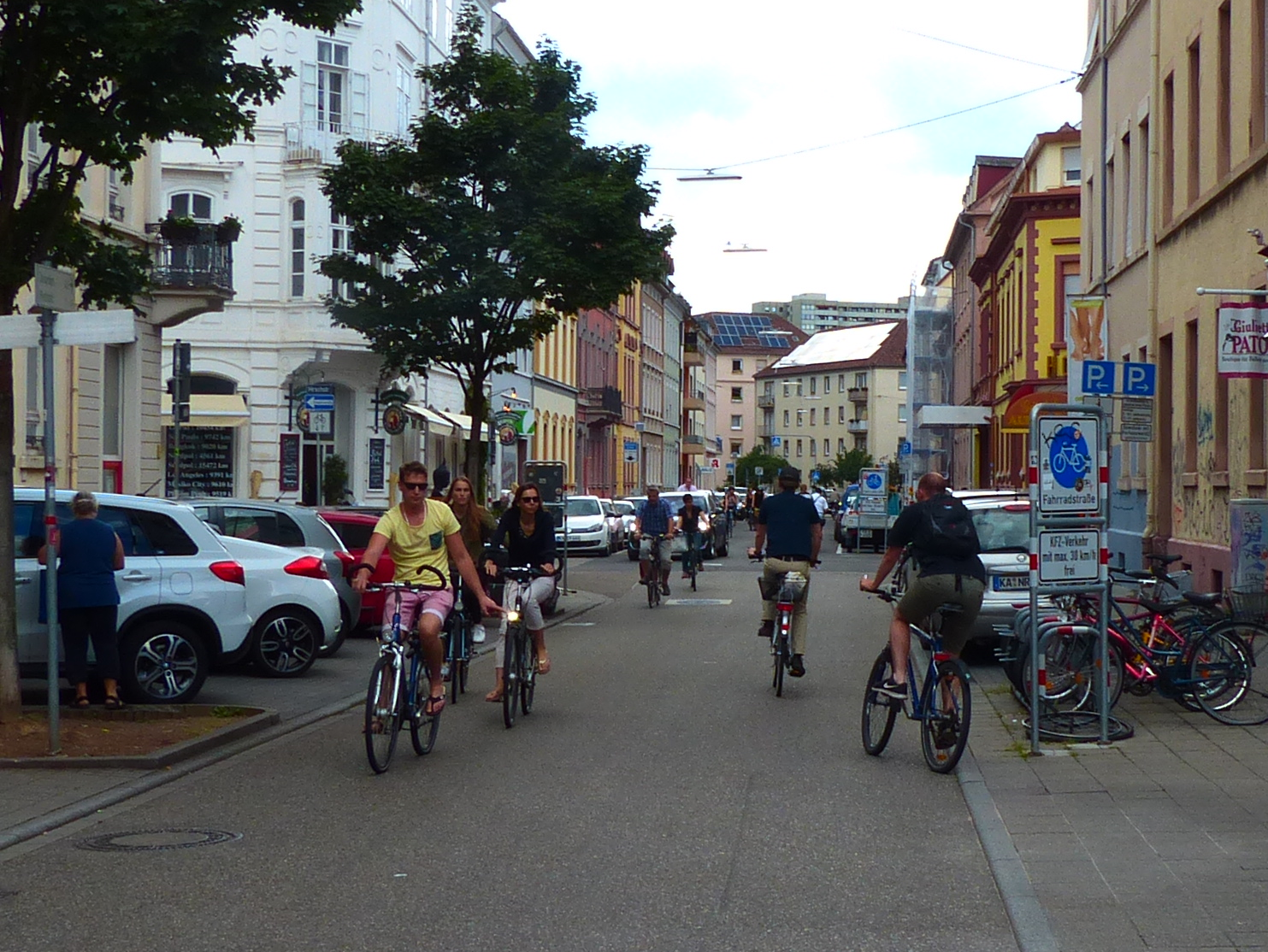 Karlsruher Innenstadtroute, Knick von der Sophienstraße (aus Richtung Westen) in die Waldstraße (nach Nordosten)